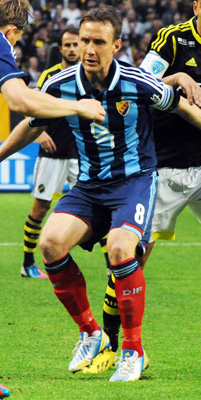 Djurgårdens IF Player Andreas Johansson.